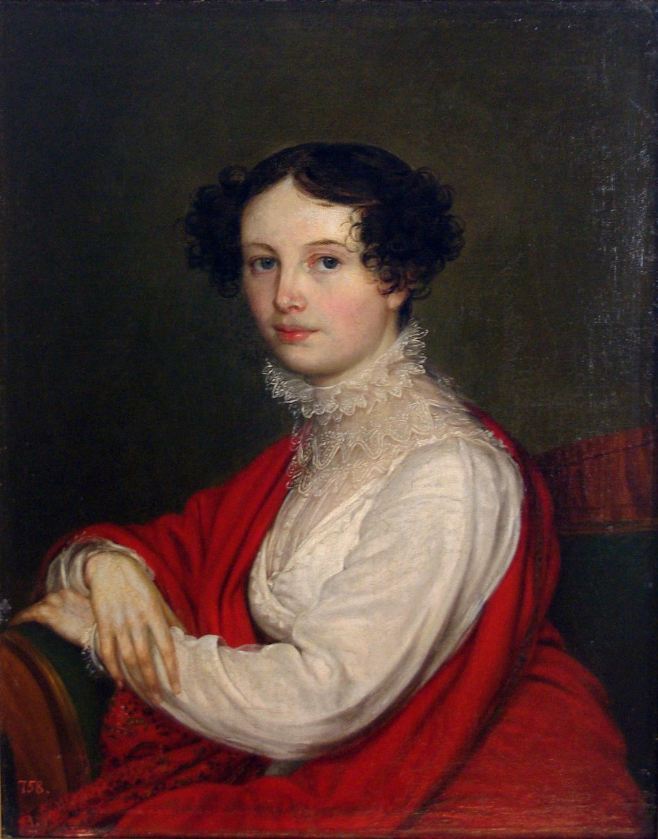 Княгиня Елизавета Борисовна Куракина (1790-1871), ур.Голицына.